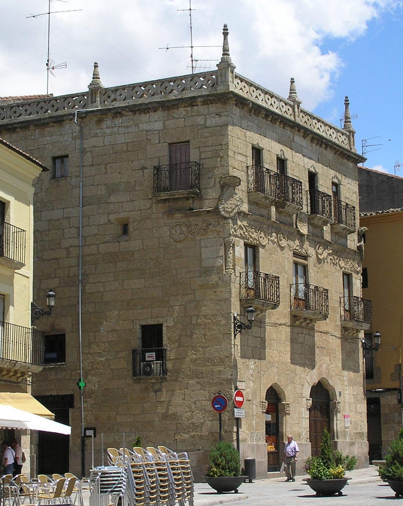 Casa del Primer Marqués de Cerralbo (vista desde el oeste).jpg. Ciudad Rodrigo (España)